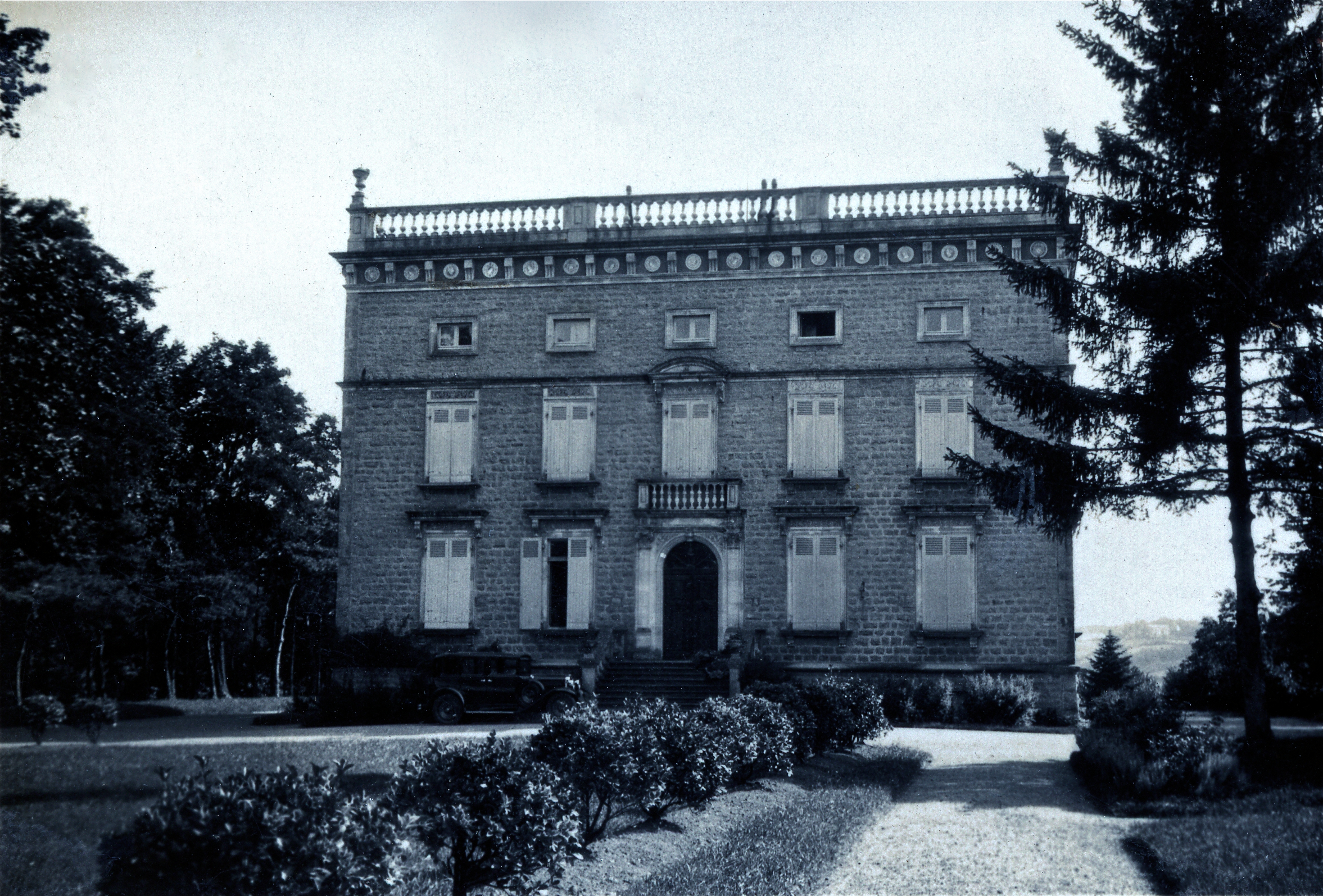 Urquijo Baita, residencia de Julio de Urquijo e Ibarra en San Juan de Luz.